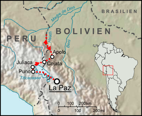 Route und Stationen der dritten Forschungsreise des Percy Fawcett